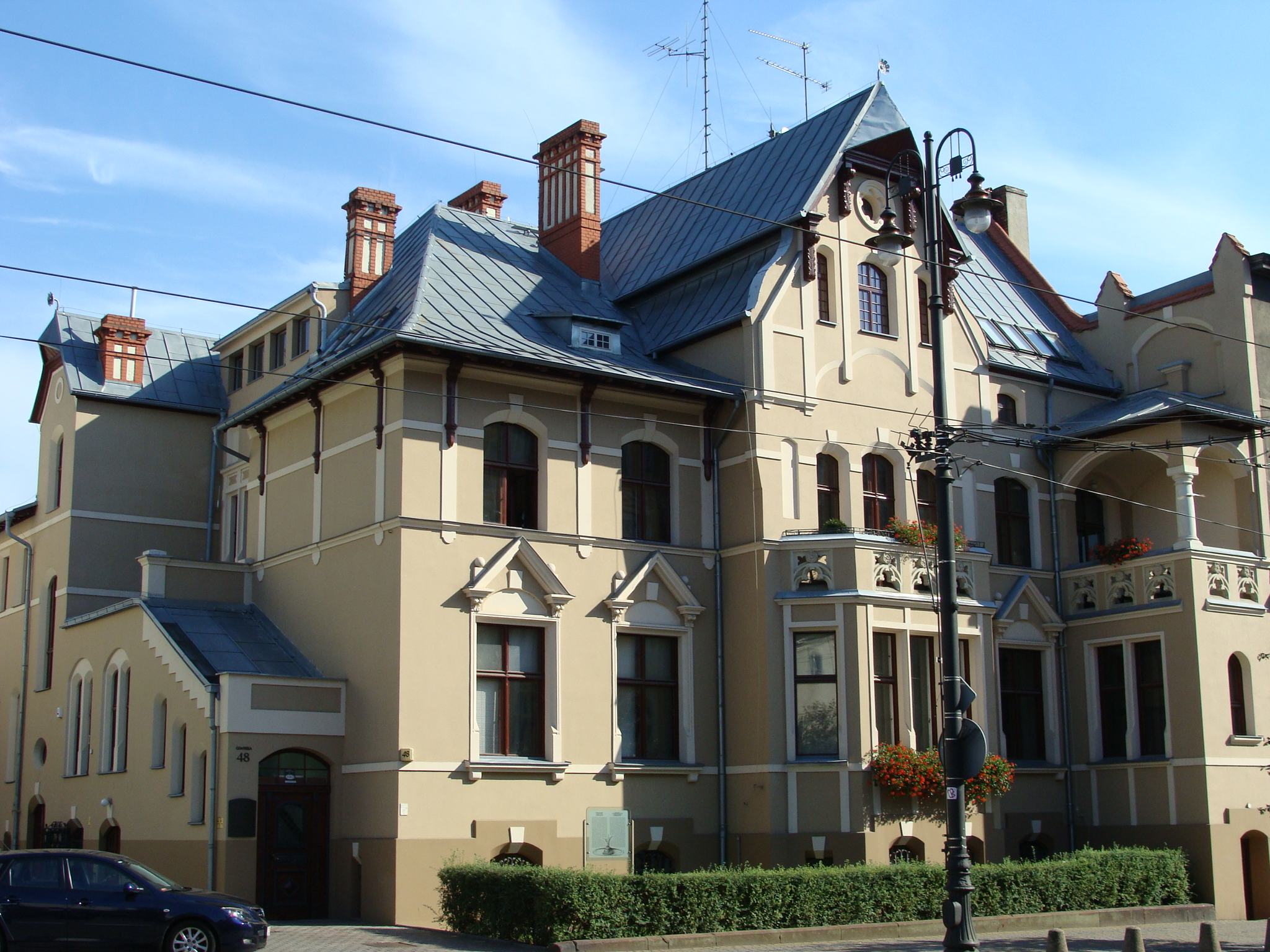 Bydgoszcz, dom (willa), 1897-1898